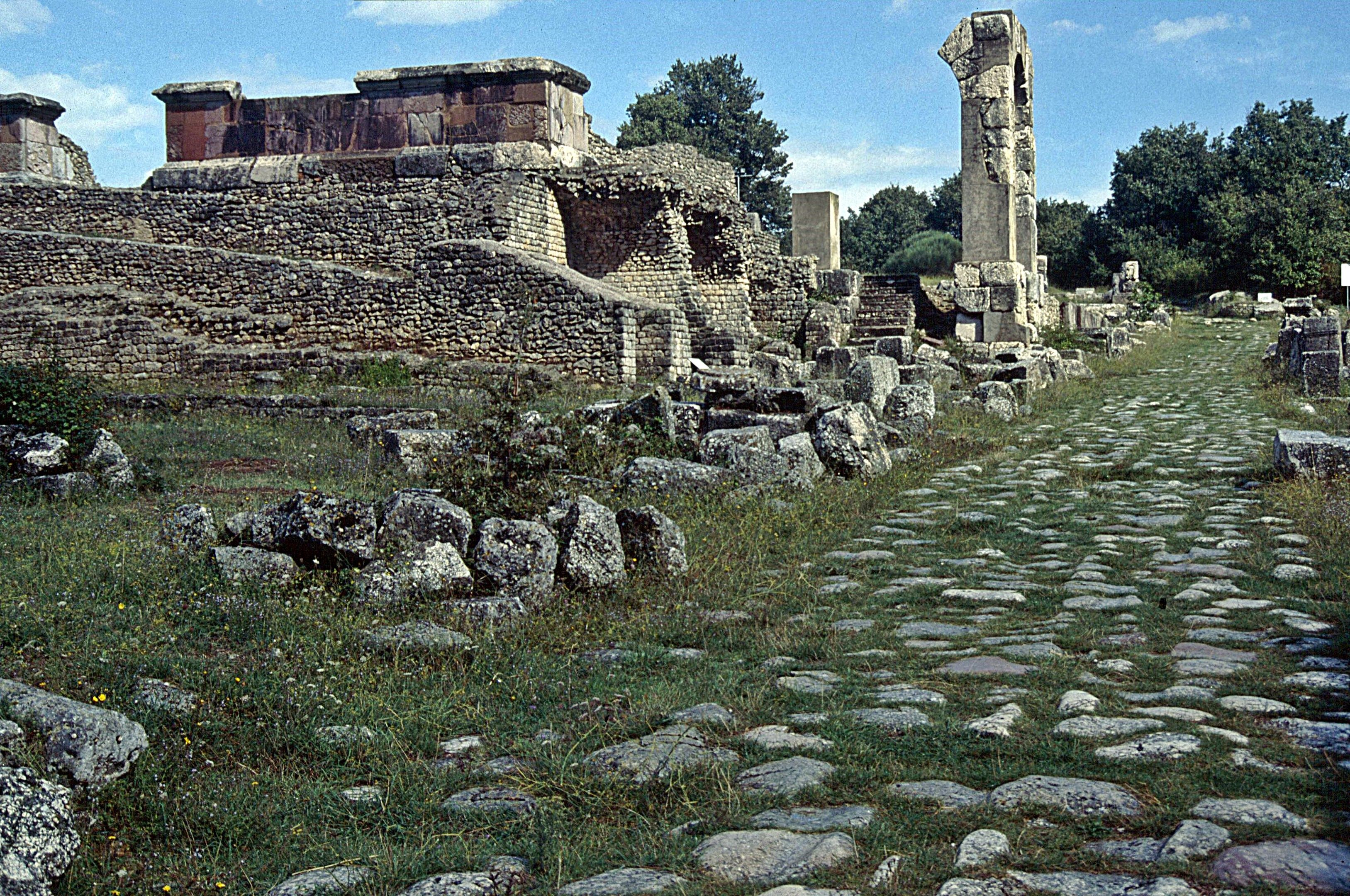 Carsulae: Via Flaminia